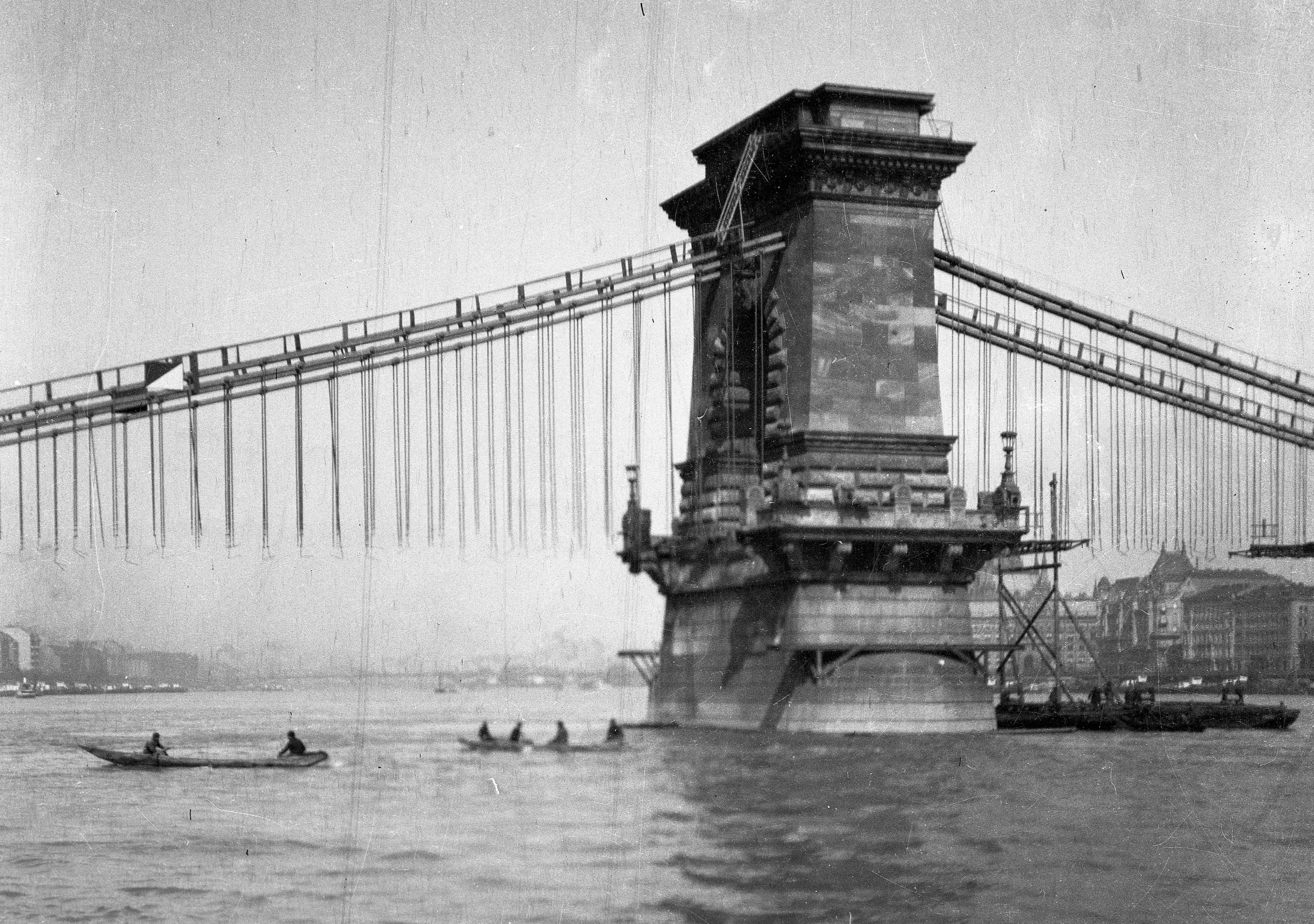 A Lánchíd átépítése, a híd vasszerkezetének megerősítése a Dunáról nézve